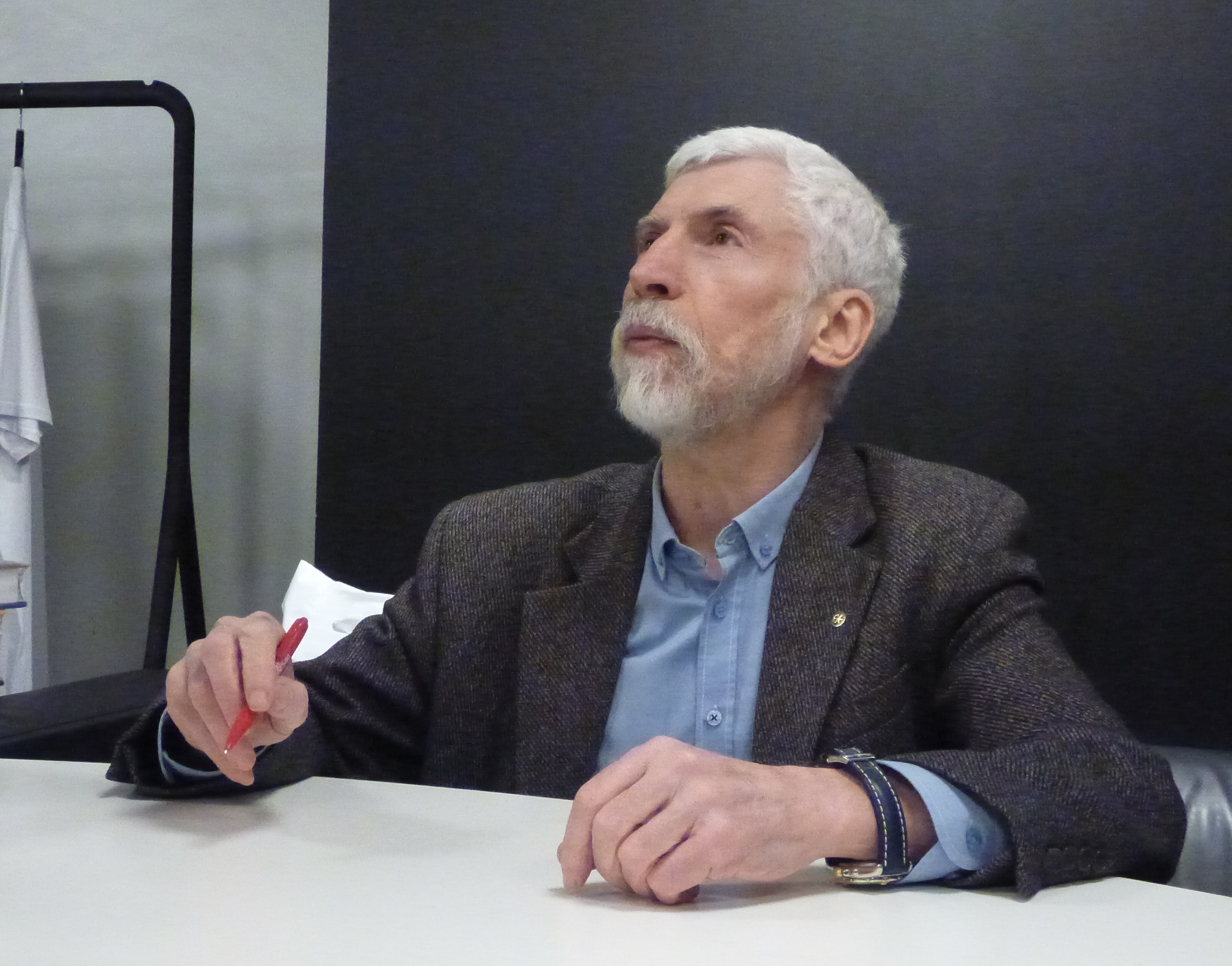 Александр Минкин подписывает свою книгу в магазине "Пиотровский", 29 января 2020 года